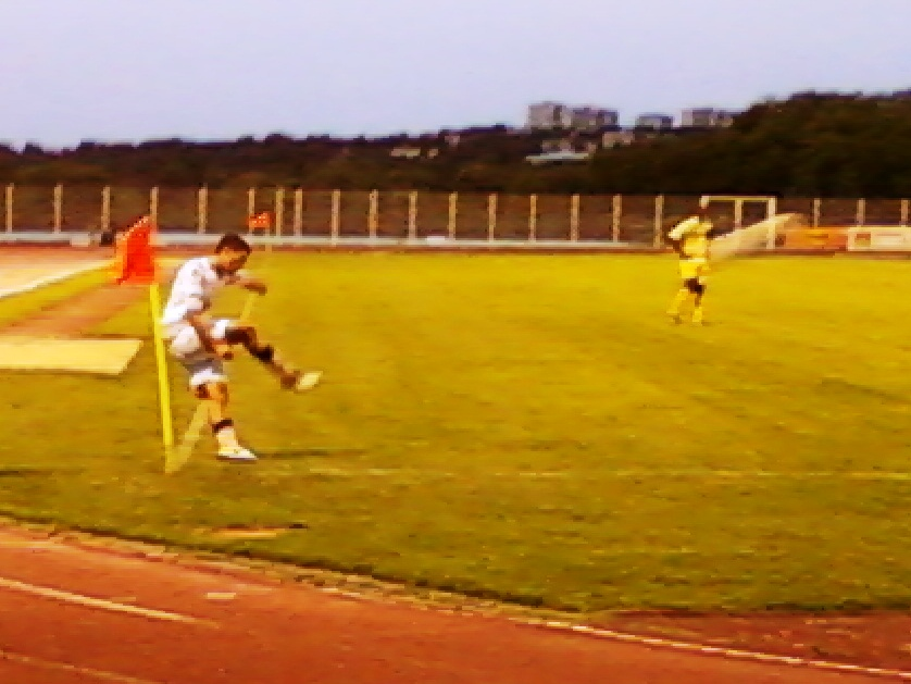 Joueur du FC Lorient B tirant un corner lors du match contre l'ES Viry-Châtillon en CFA du 17 septembre 2011